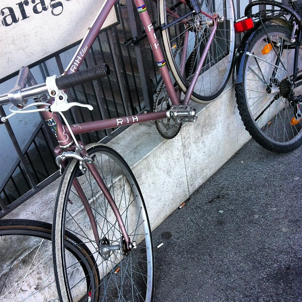 RIH bicycle frame